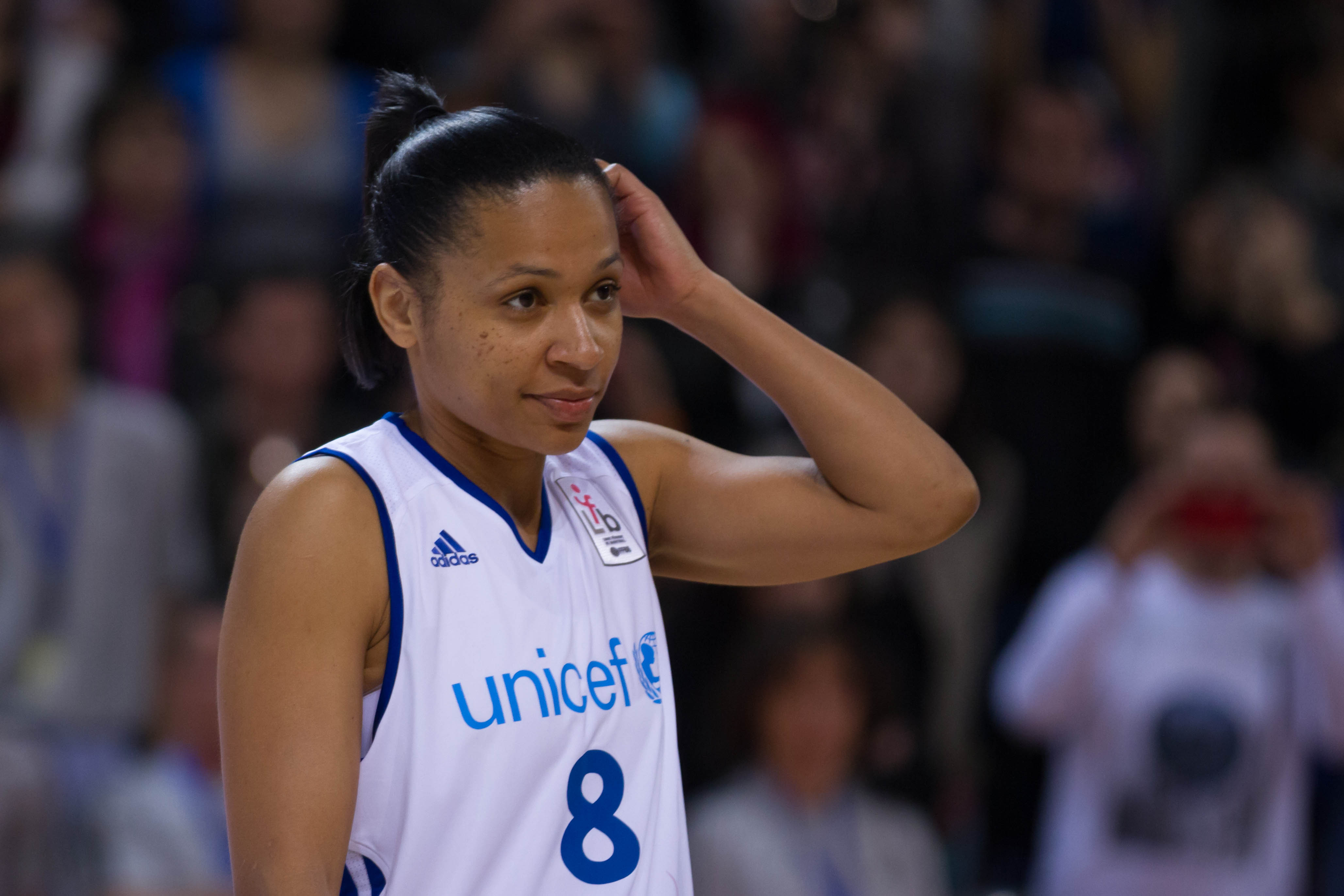 Edwige Lawson-Wade, match de gala championnes de cœur